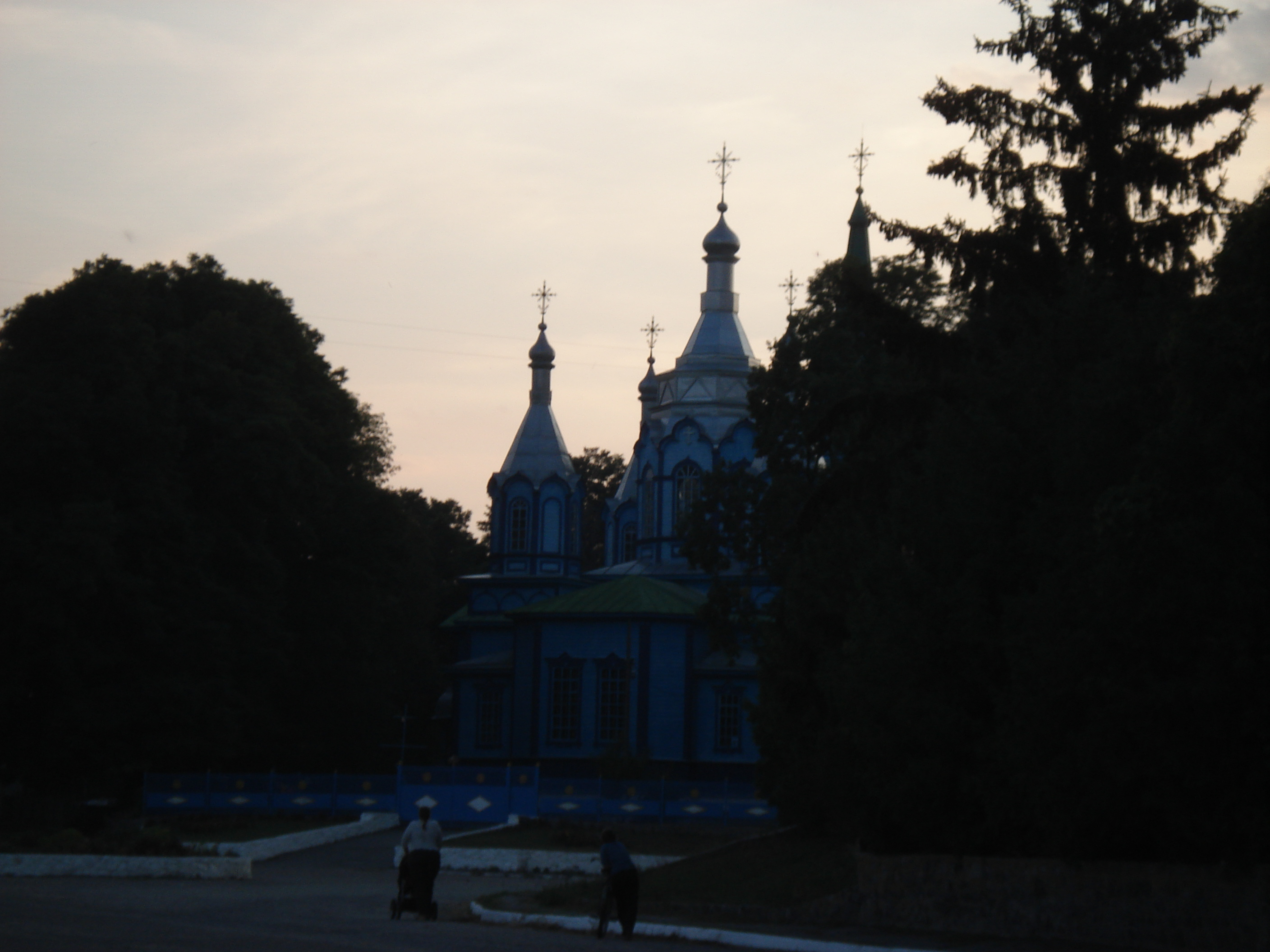 Церква Архістратига Михаїла у селі Лукаші Баришівського району Київської області. Вид з центральної площі села